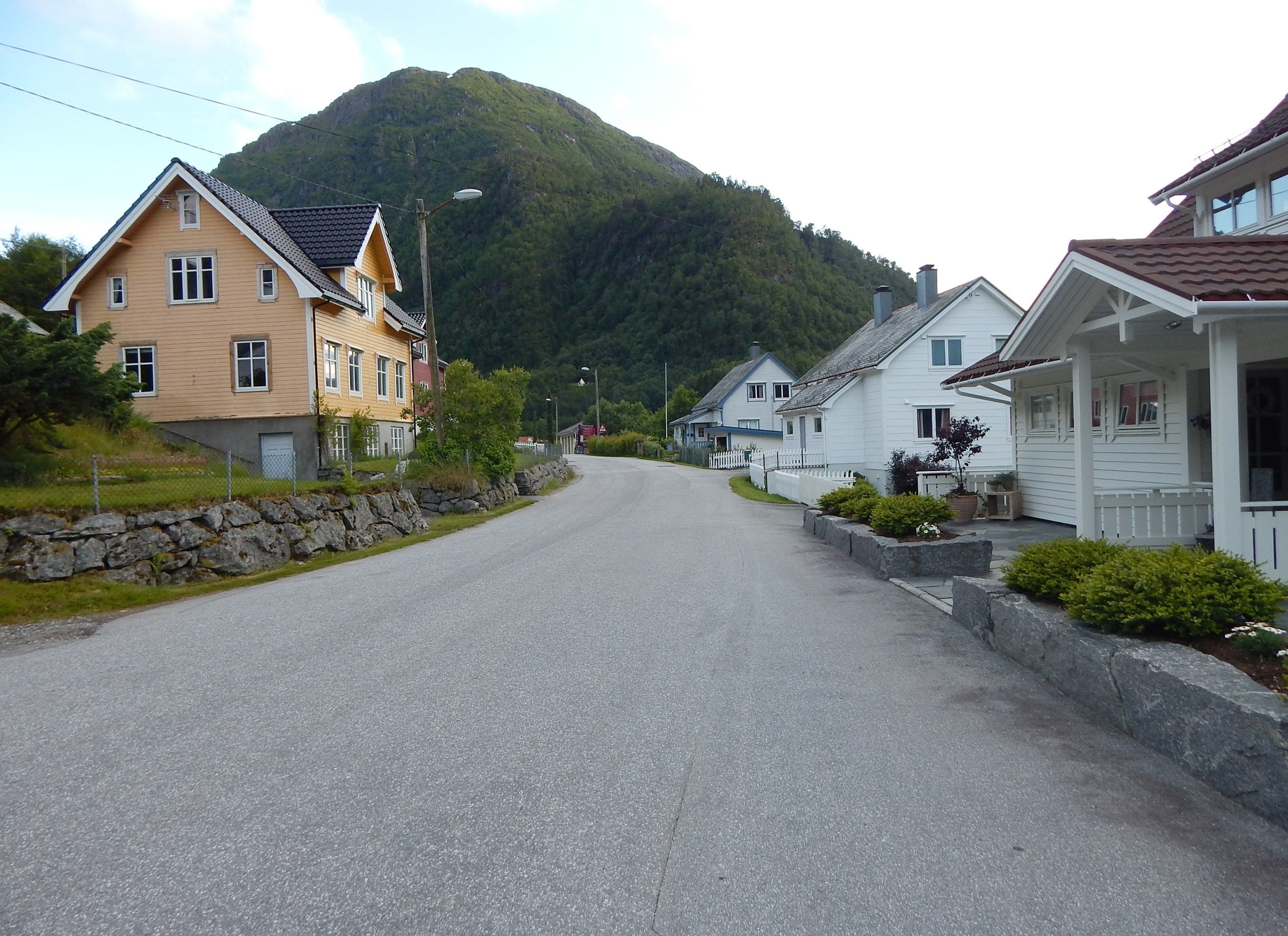 Hyen (Straume)